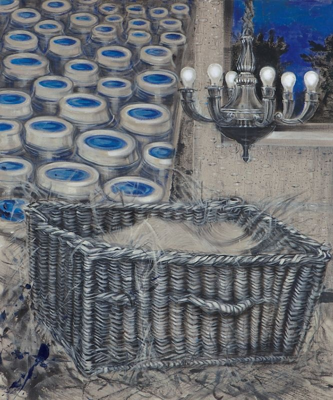 Malba od Xénie Hoffmeisterové. Akryl na plátně, 180 x 150 cm, 2011